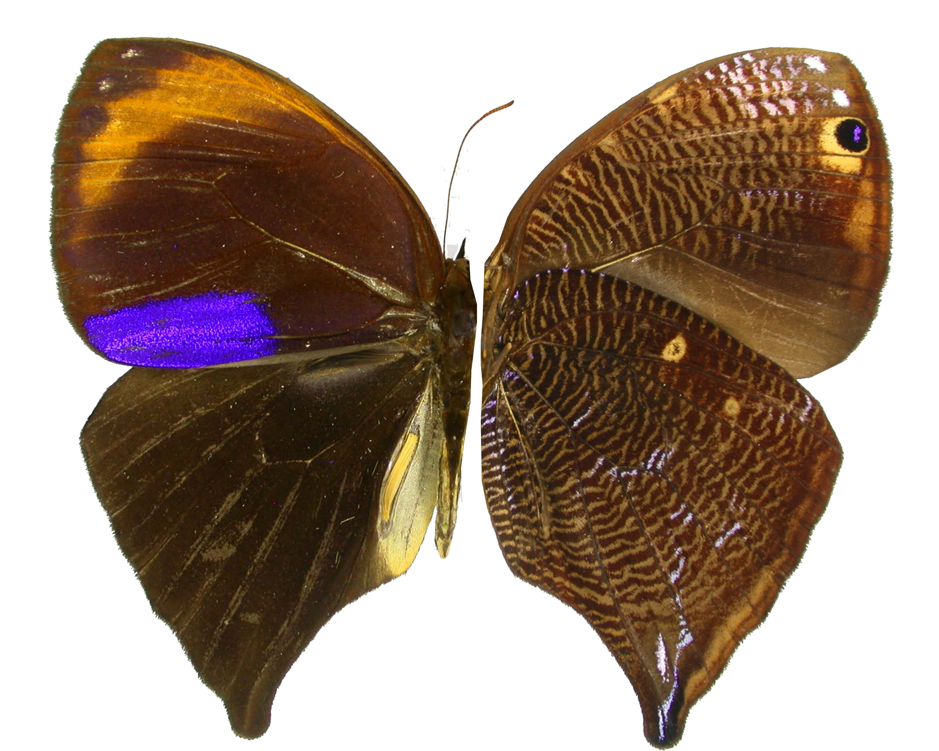 Nymphalidae Ecuador